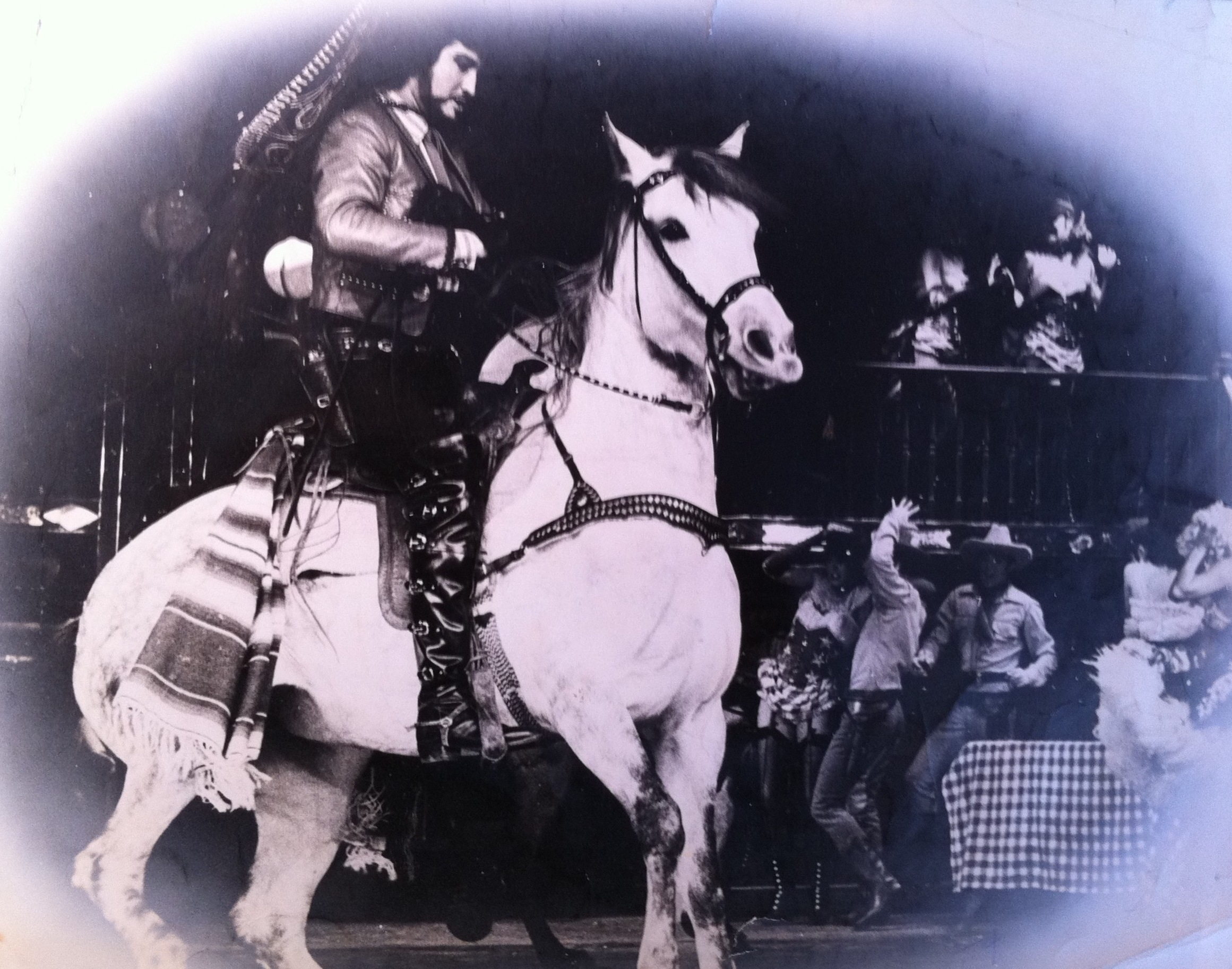 André Cagnard au lido